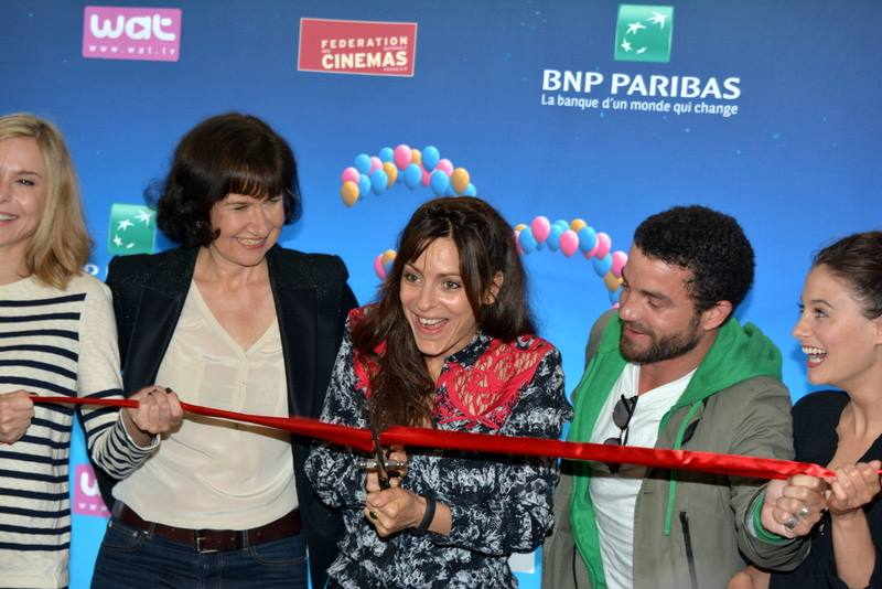 Pascale Arbillot, Anne Le Ny, Audrey Dana, Guillaume Gouix et Mélanie Bernier à l'ouverture de la fête du cinéma 2014